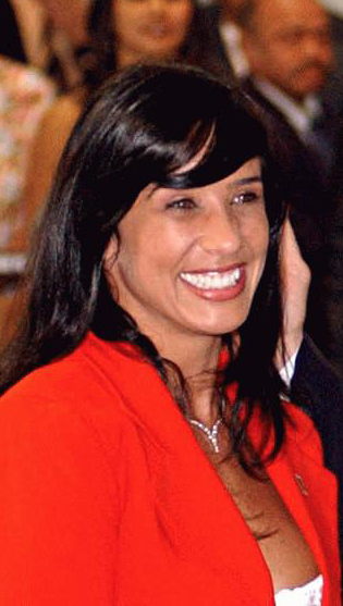 A dançarina brasileira Scheila Carvalho.